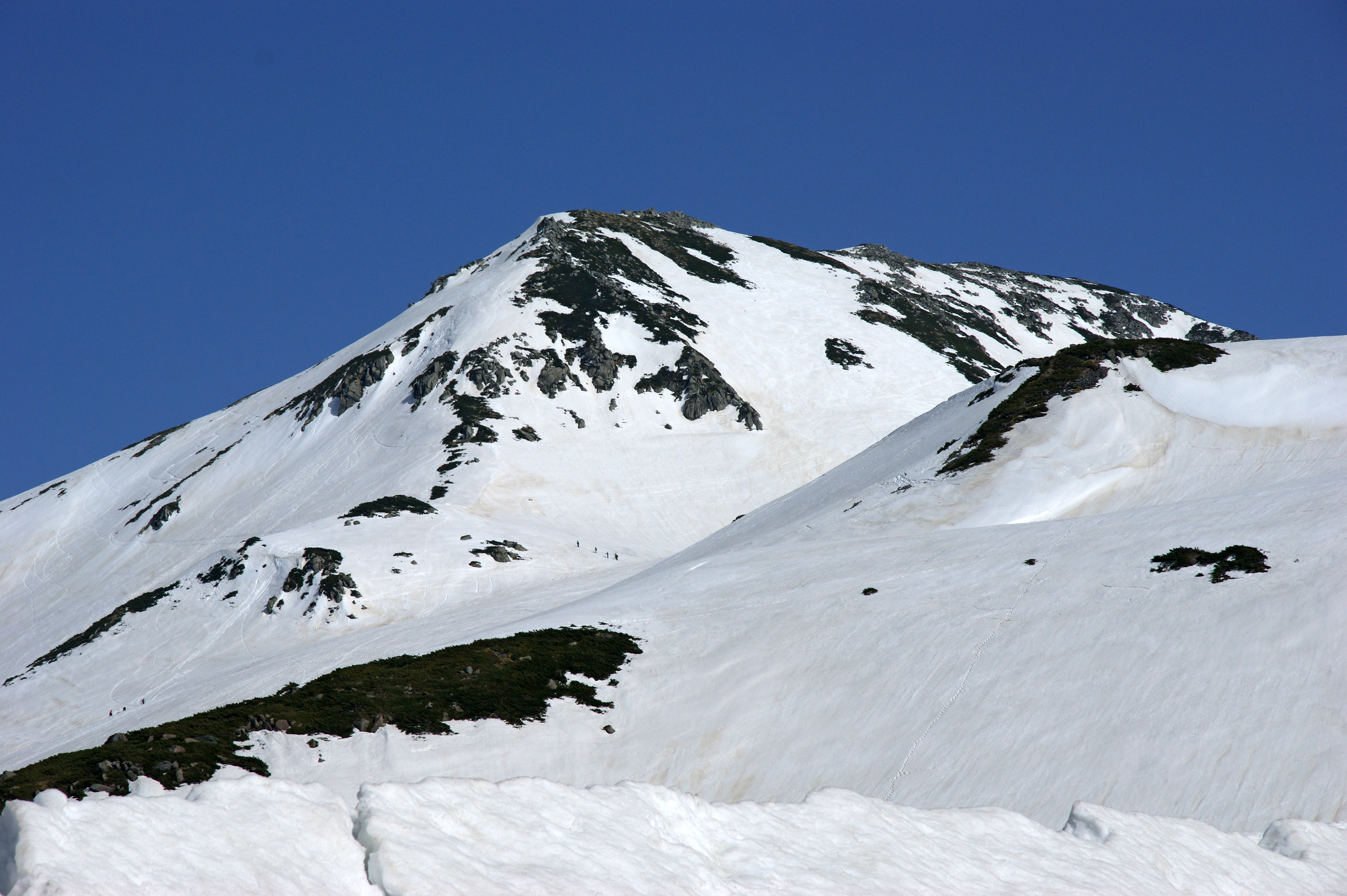 Mt. Jodo peaks(2831m) from Murodo(2450m), Toyama prefecture, Japan